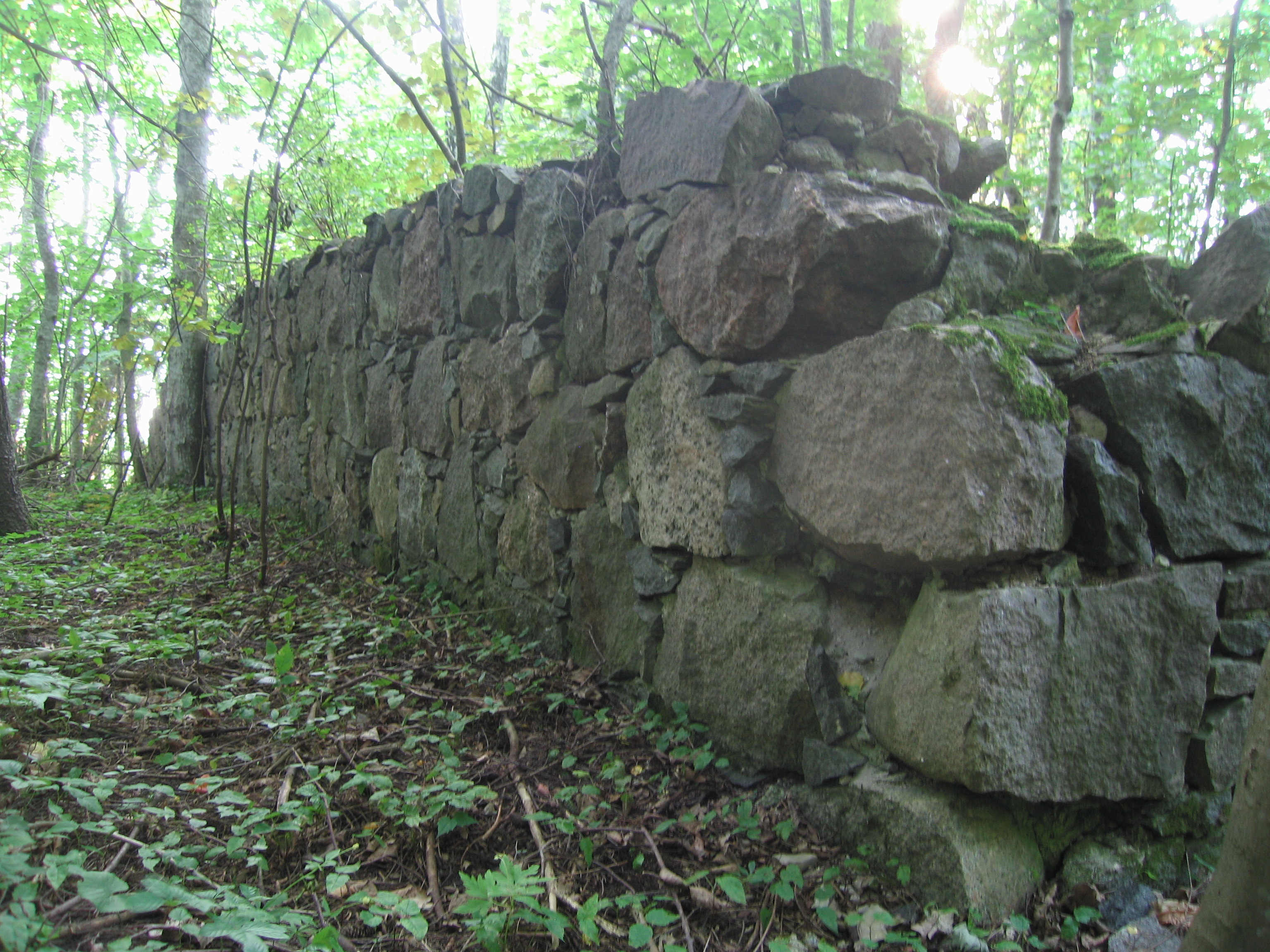 Kalmistumüüri idanurk